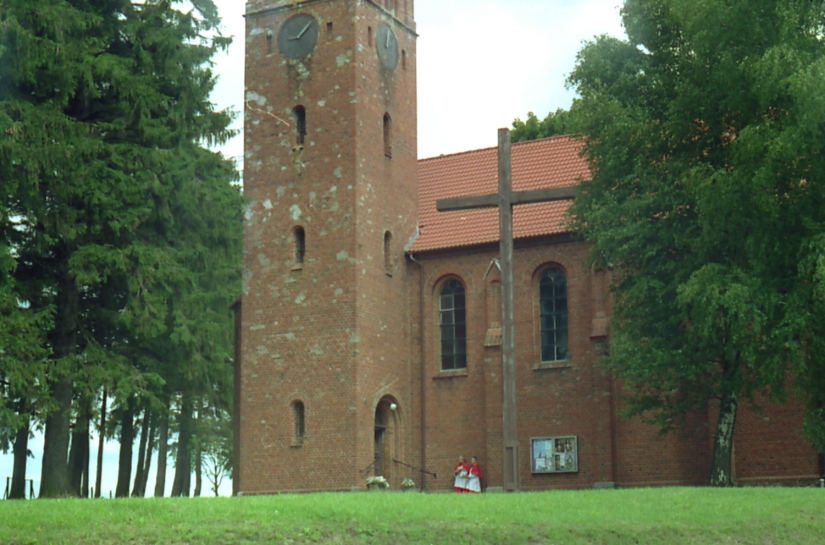 Bruskowo Wielkie, altar boy